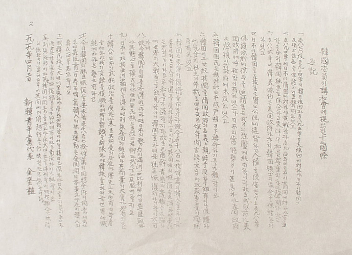 1918년 8월 중국 상해(上海)에서 한국의 망명 독립지사들이 조직한 신한청년단(新韓靑年團: 일명 신한청년당)에서 1919년 4월 3일 파리강화회의에 제출한 13개조이다.